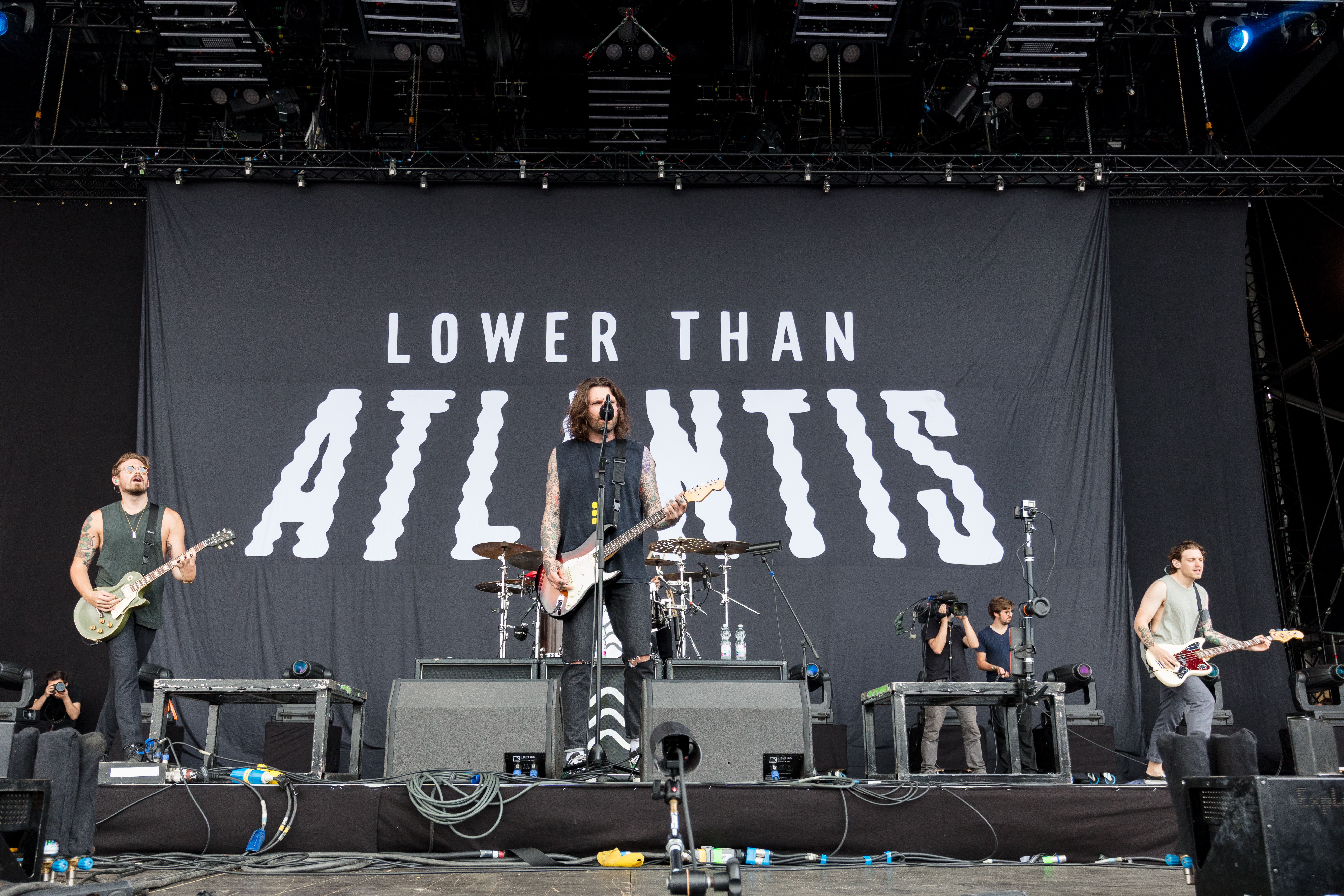 Lower than Atlantis during Rock am Ring at Nürburgring, Nürburg, Rheinland Pfalz, Germany on 2017-06-03, Photo: Sven Mandel